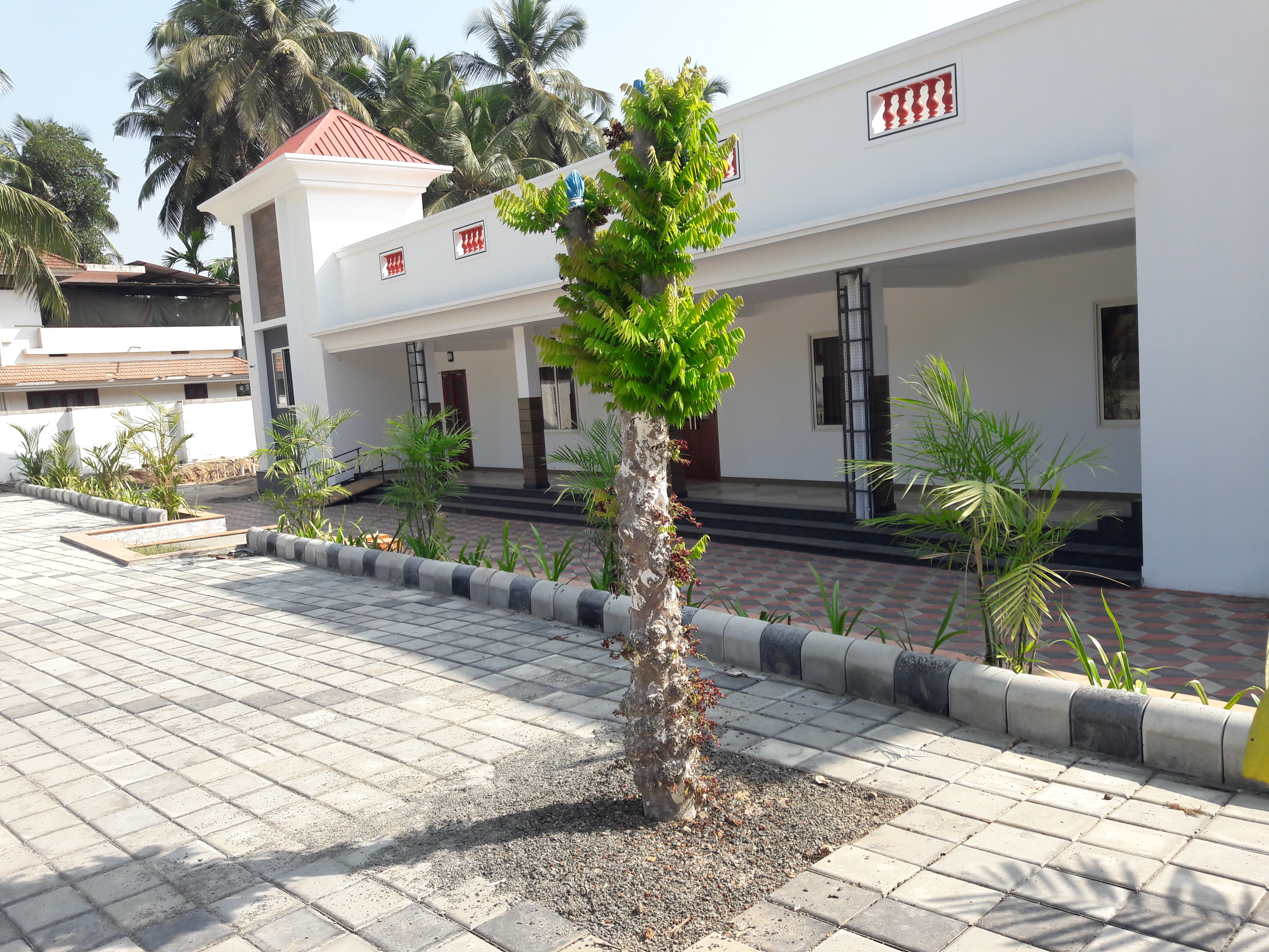 പറിച്ചു നടല്‍ കഴിഞ്ഞു ഇലകള്‍ തളിര്‍ത്ത്‌ വരുന്ന ഇരുമ്പാമ്പുളി മരം.